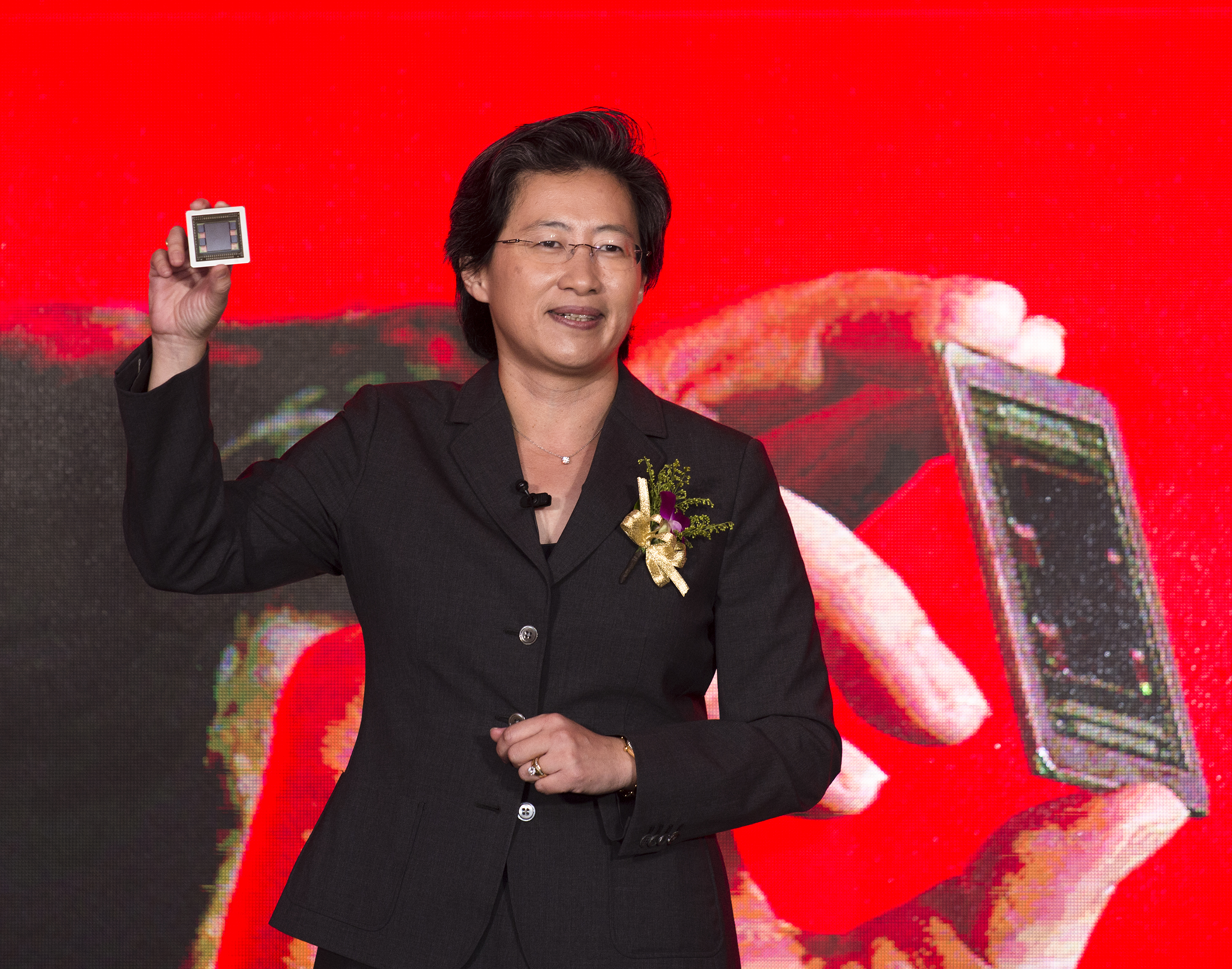 中文（台灣）: 超微半導體總裁暨執行長​蘇姿丰。